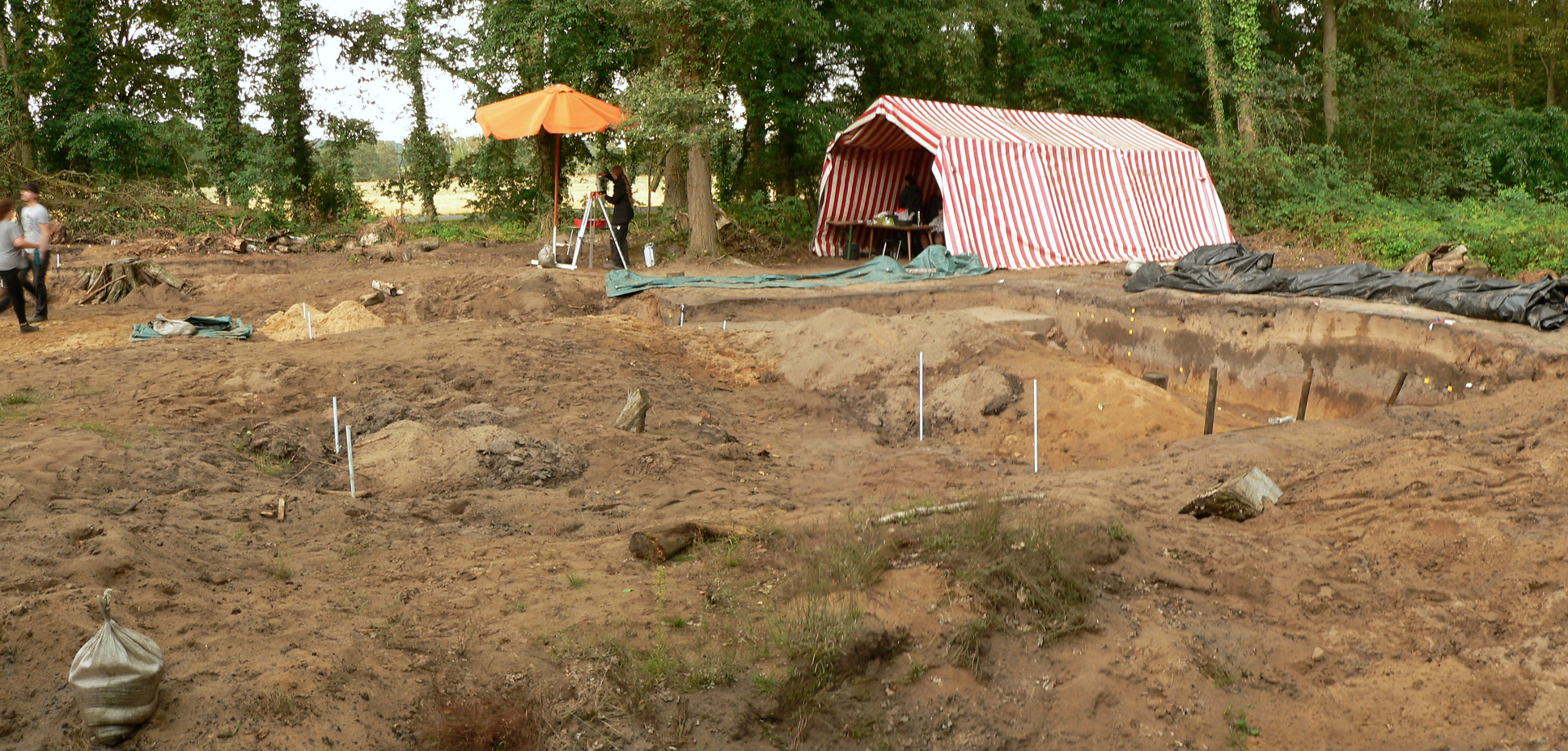 Grabungsareal der Sächsisch-karolingischen Siedlung von Liebenau während der Grabungskampagne